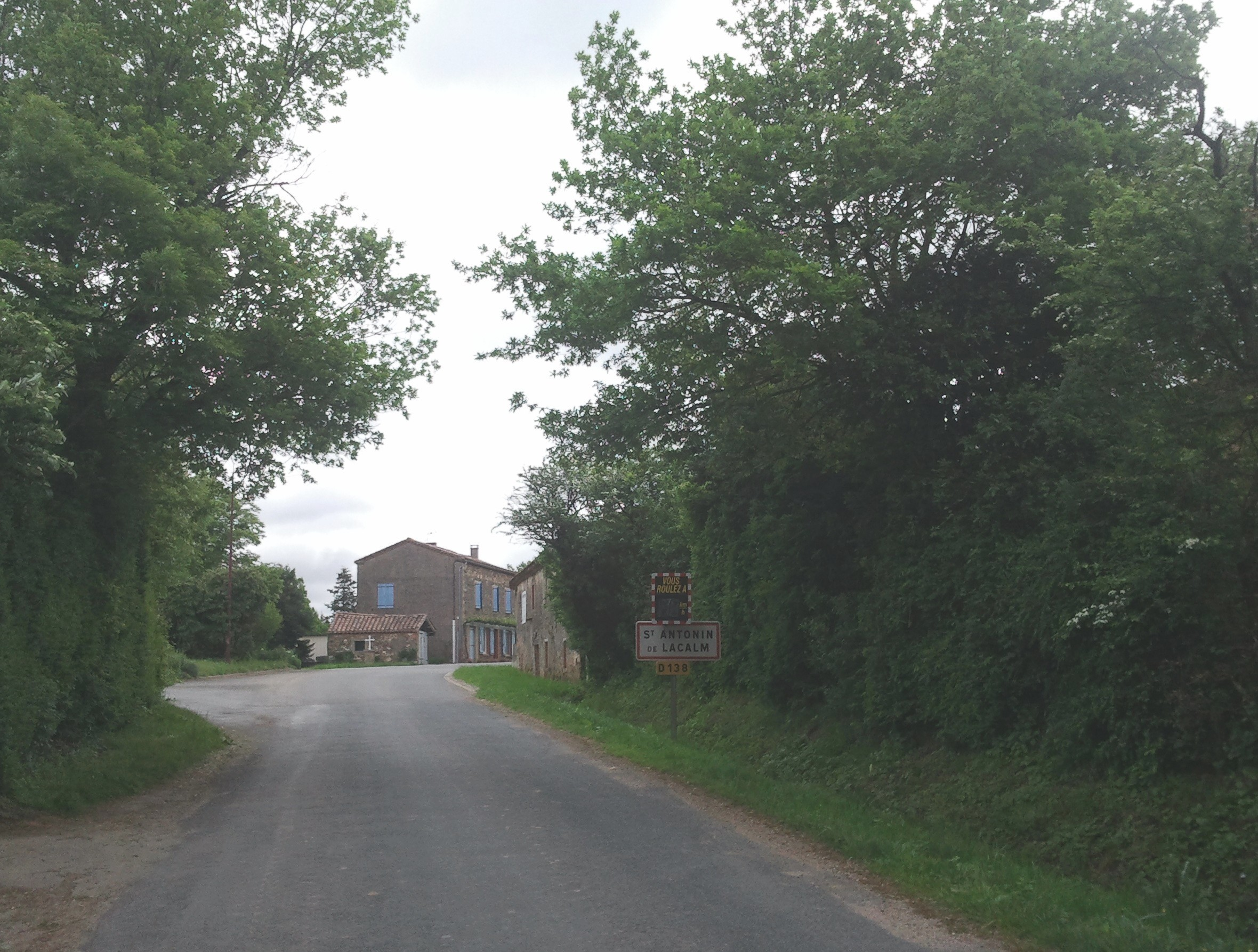 L'entrée de Saint-Antonin-de-Lacalm sur la D138